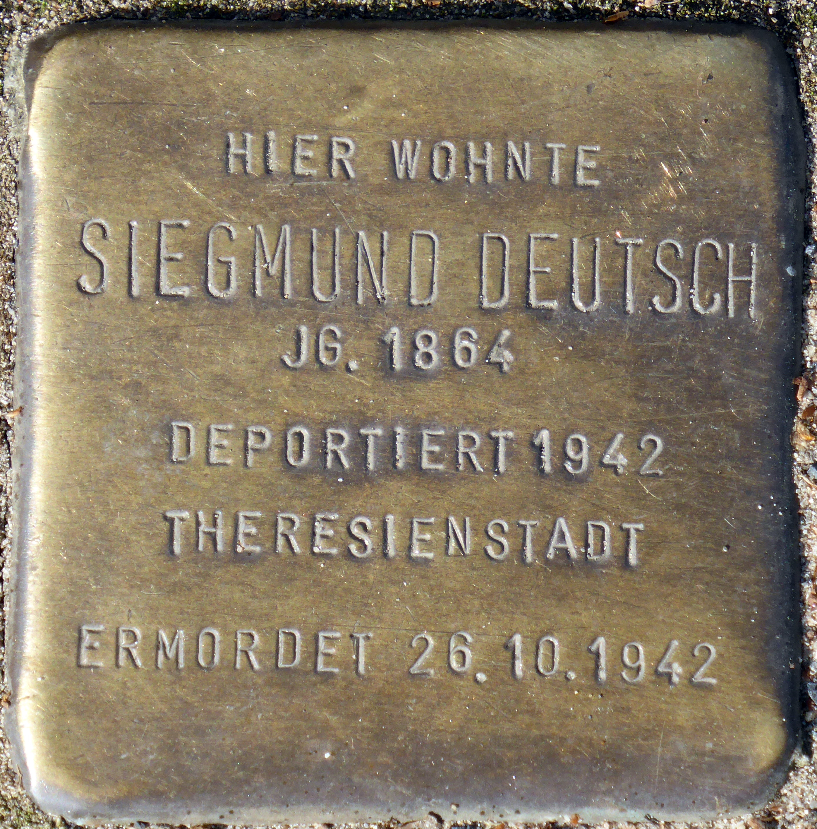 Stolperstein: Siegmund Deutsch, Walter-Rathenau-Straße 13, Köln